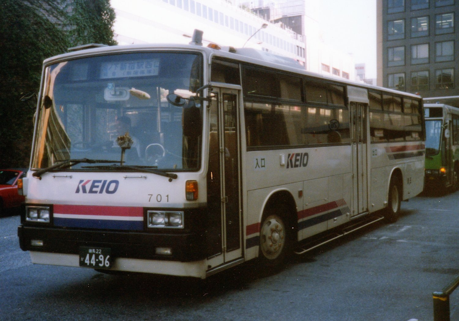 Keio Bus D38701 "One Roma" Mitsubishi P-MP618P改 at Shinjuku Sta.